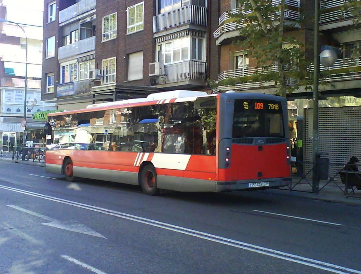 Autobús 'Hispano Carrocera de la línea 109 de la Empresa Municipal de Transportes de Madrid.